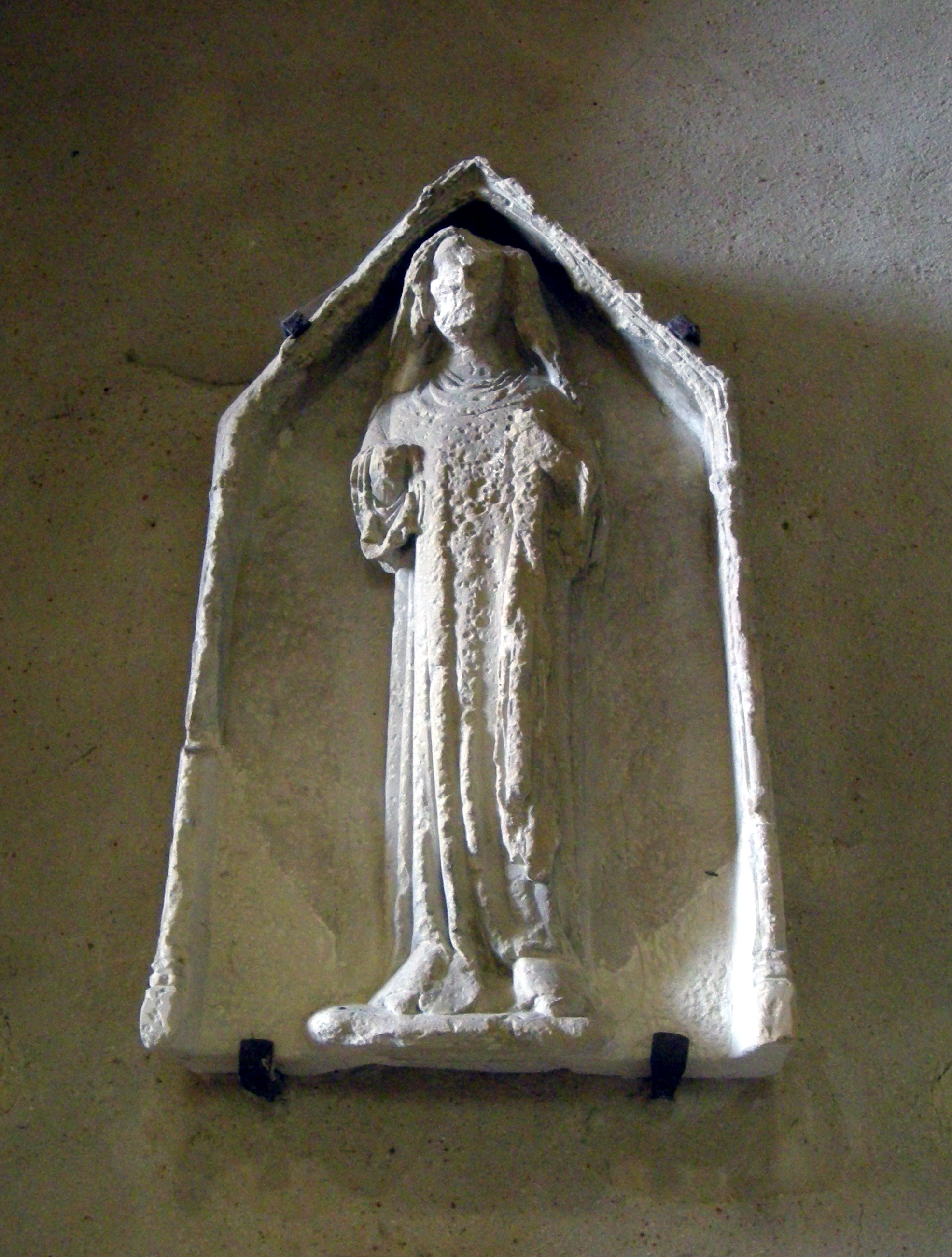 Sainte Opportune à l'abbaye de Lessay (relief en pierre calcaire du XIIIe siècle provenant de l'ancienne égloise paroissiale de Sainte Opportune sur le territoire de laquelle fut fondée en 1056 l'Abbaye de Lessay